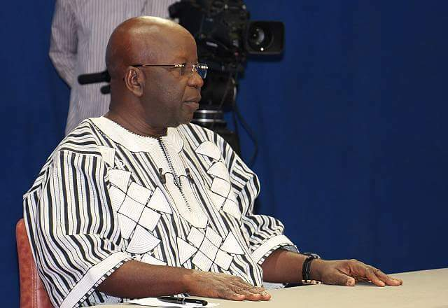 Simon Compaoré, à la RTB pendant l'émission dialogue citoyen du 30 juin 2016